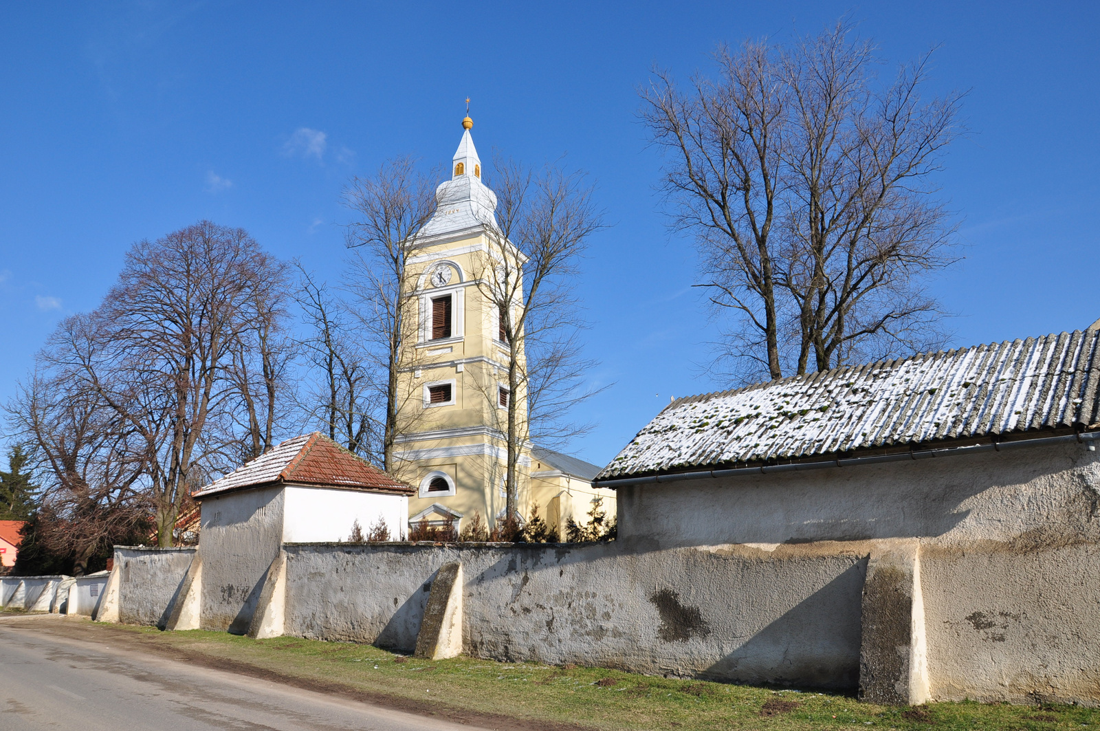 Ref. templom középkori eredetű, 13-14. sz. Átépítve 1805-ben és 1822-1824 között. Körítőfal, 16. sz. Lelkészlak, 18. sz. - (Hajdú-Bihar m., Álmosd, Bocskai utca 1.) This is a photo of a monument in Hungary. Identifier: 5183